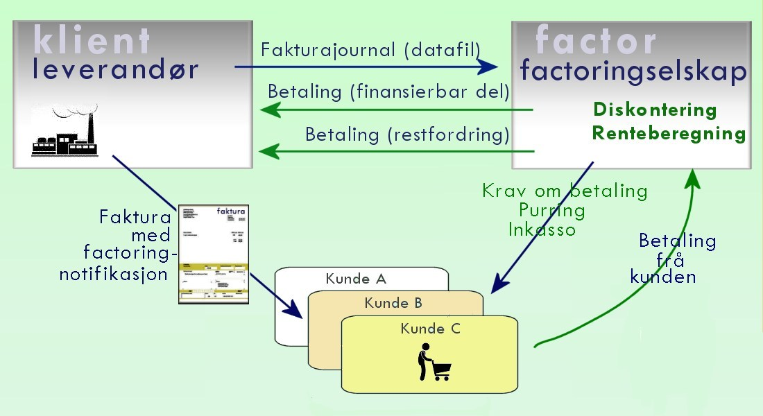 Skjematisk oversikt over dataflyt ved factoringfinansiering.